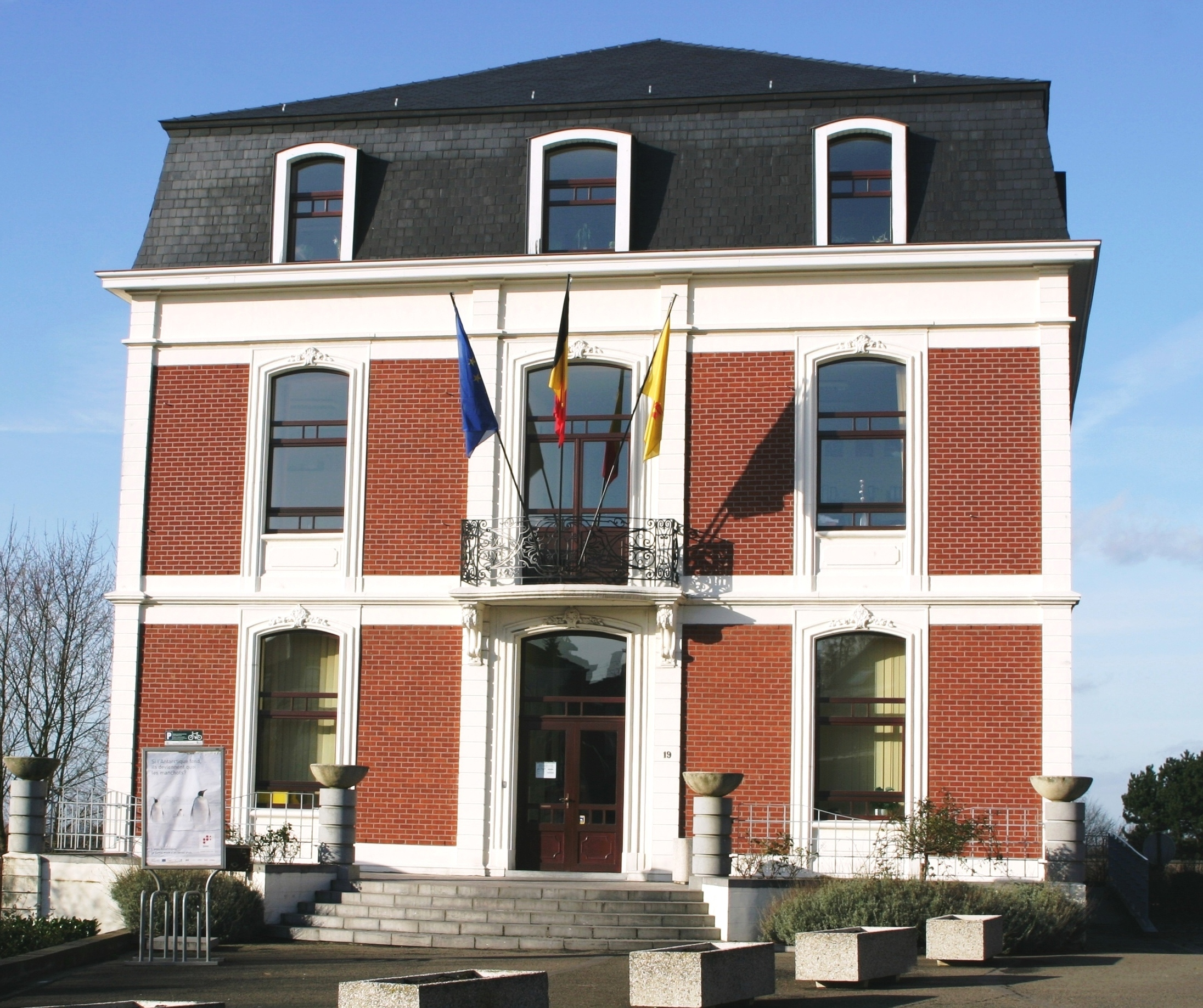 Gemengenhaus vu Fléron.